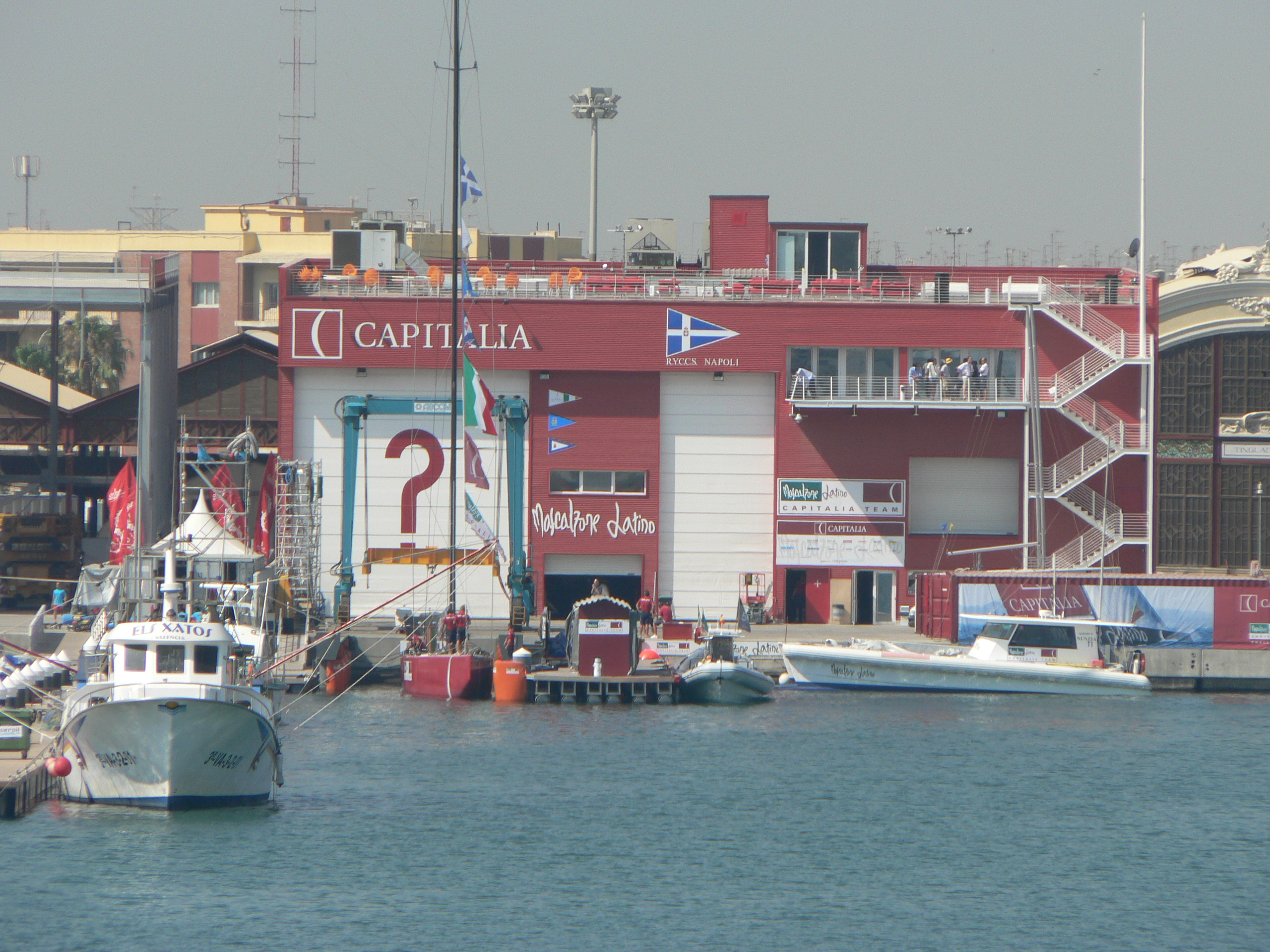 Coupe de l'America 2007 - Mescalzone latino